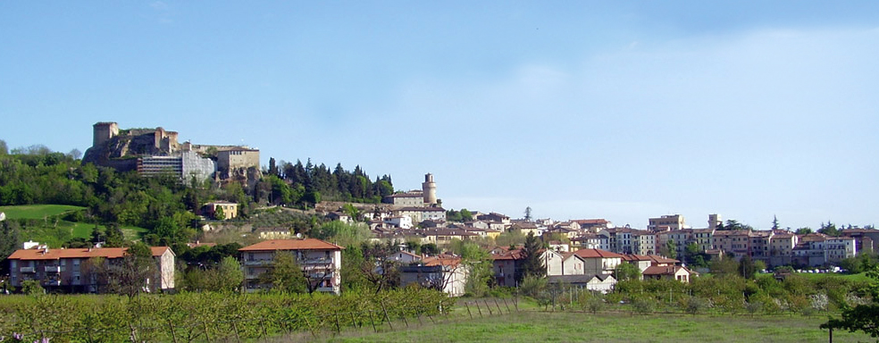 Castrocaro Terme - panorama - vista da sud;foto scattata dall'autore primavera 2009